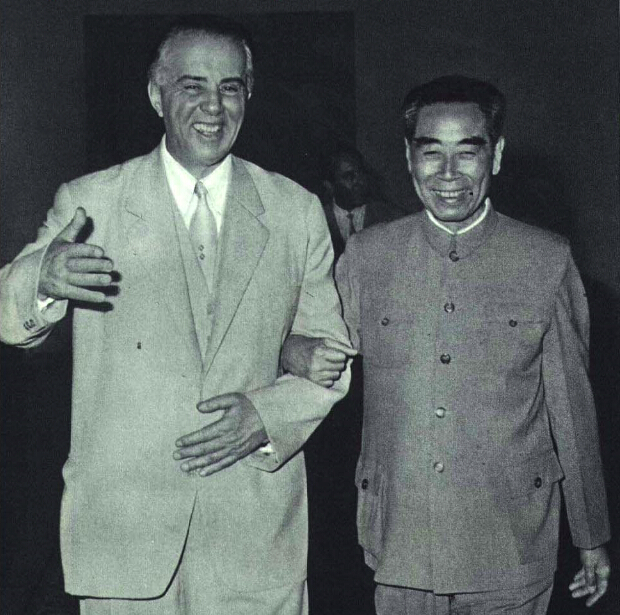 1966-10 1966年霍查与周恩来